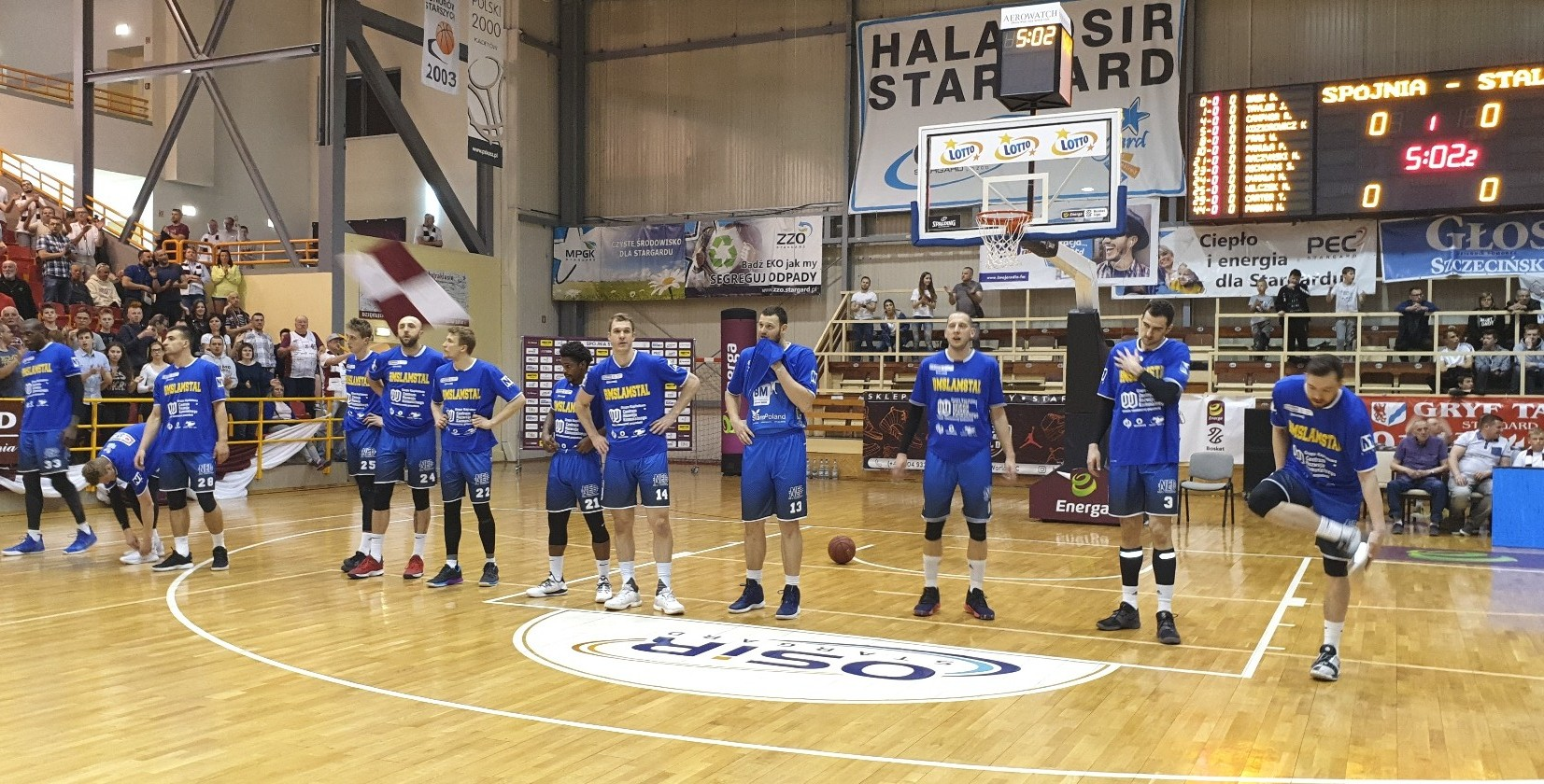 Stal Ostrów Wielkopolski